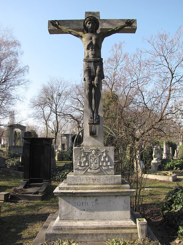 Tóth Tihamér (Szolnok, 1889. jan. 14. – Bp., 1939. máj. 5.) egyházi író, r. k, püspök, egyetemi tanár sírja Budapesten. Kerepesi temető: 34-1-29.